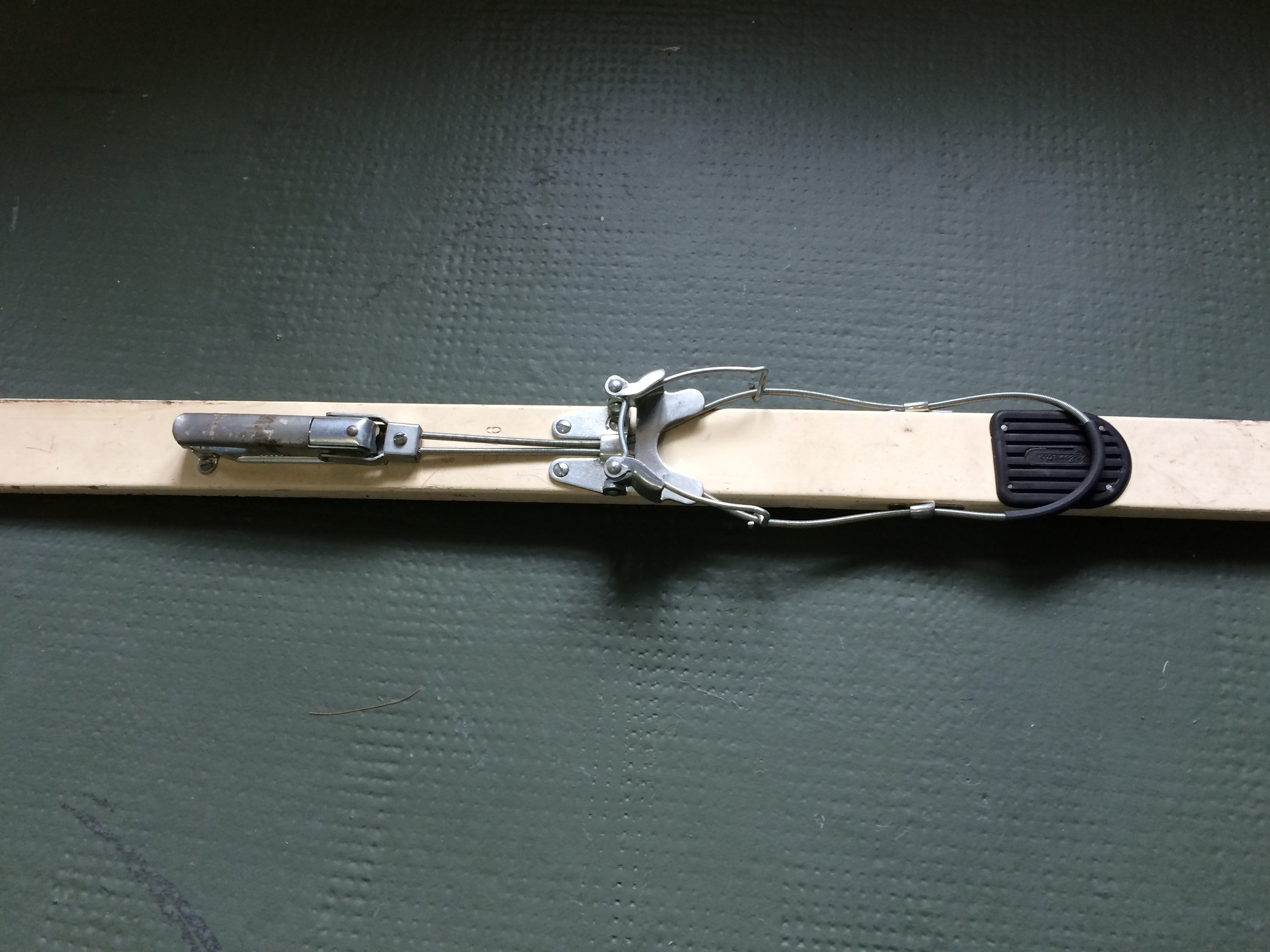 Skitourenbindung für den militärischen Skilauf